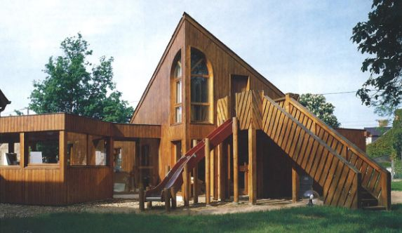 Ecole Maternelle de Marolles